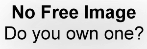 place holder